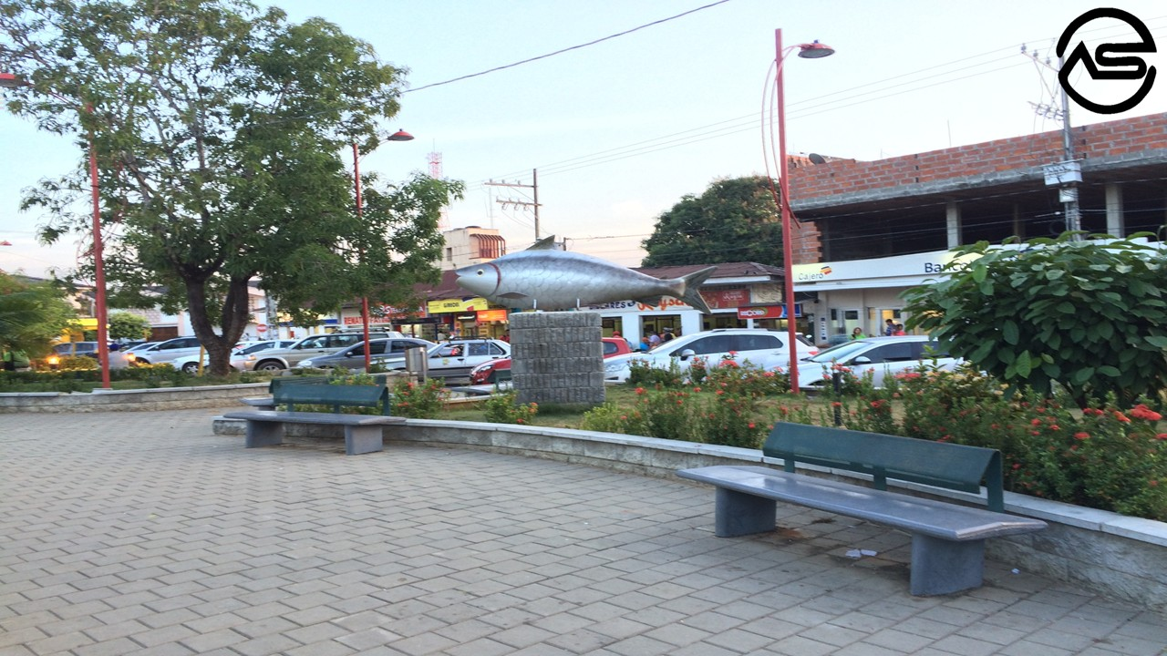 Bocachico Parque